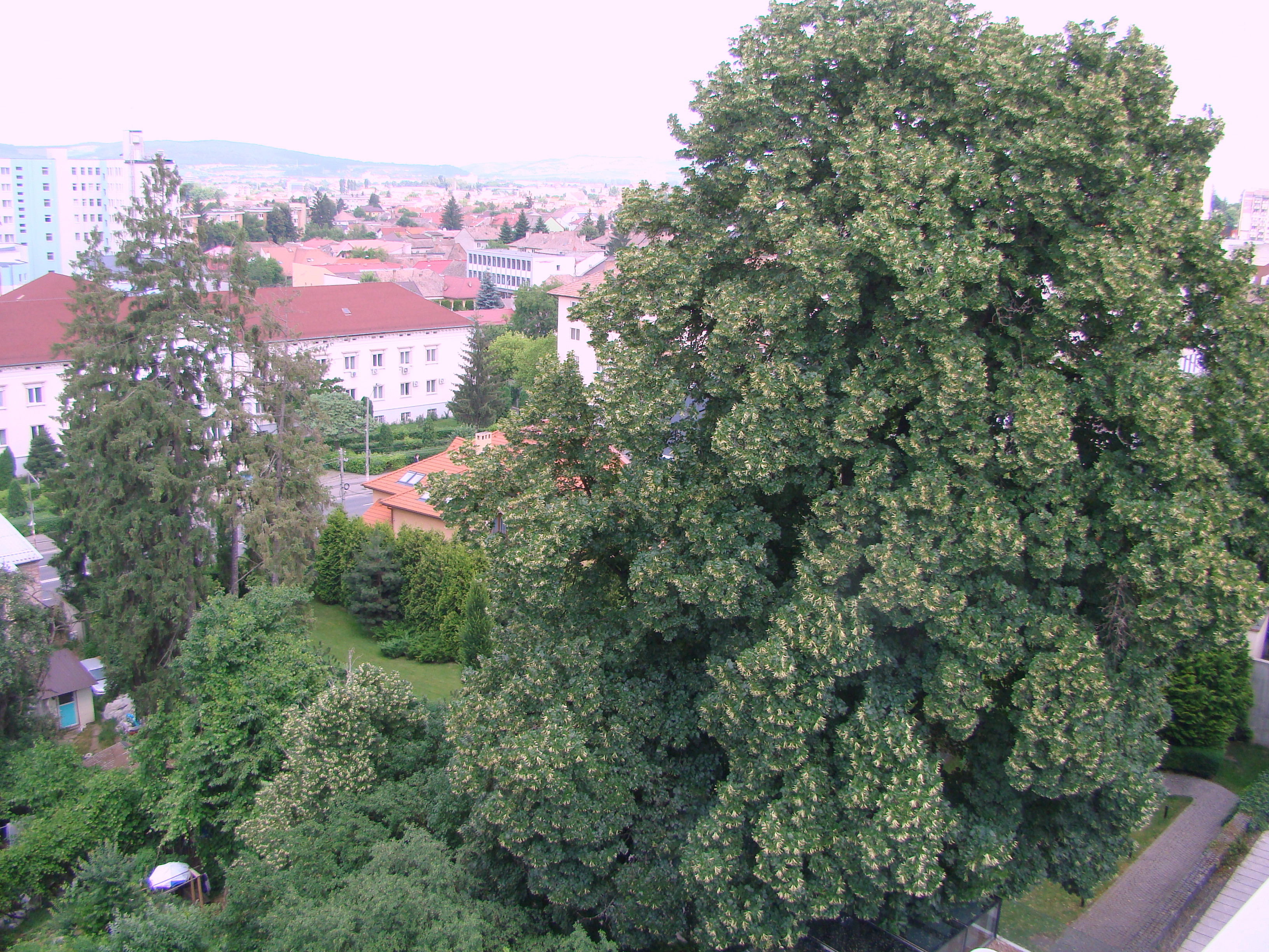 Parc, municipiul Târgu Mureș, str. Doja Gheorghe 35 1910 02